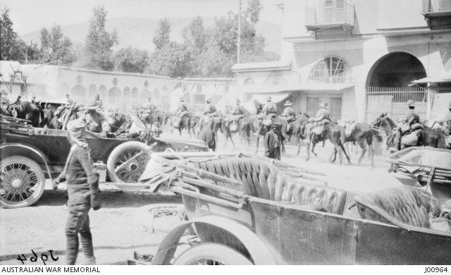 Light Horsemen of the Australian Mounted Division riding through a street in Damascus, Syria. A number of motor cars parked in the foreground.כוחות מהדיביזיה האוסטרלית הרכובה ברחובות דמשק